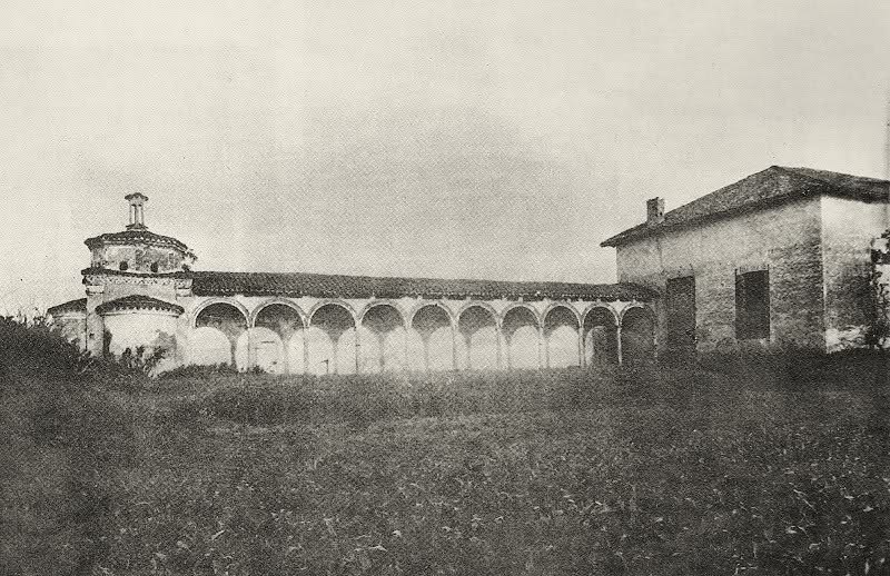 Quattrocentesca Cascina Pozzobonelli nel XIX secolo Milano